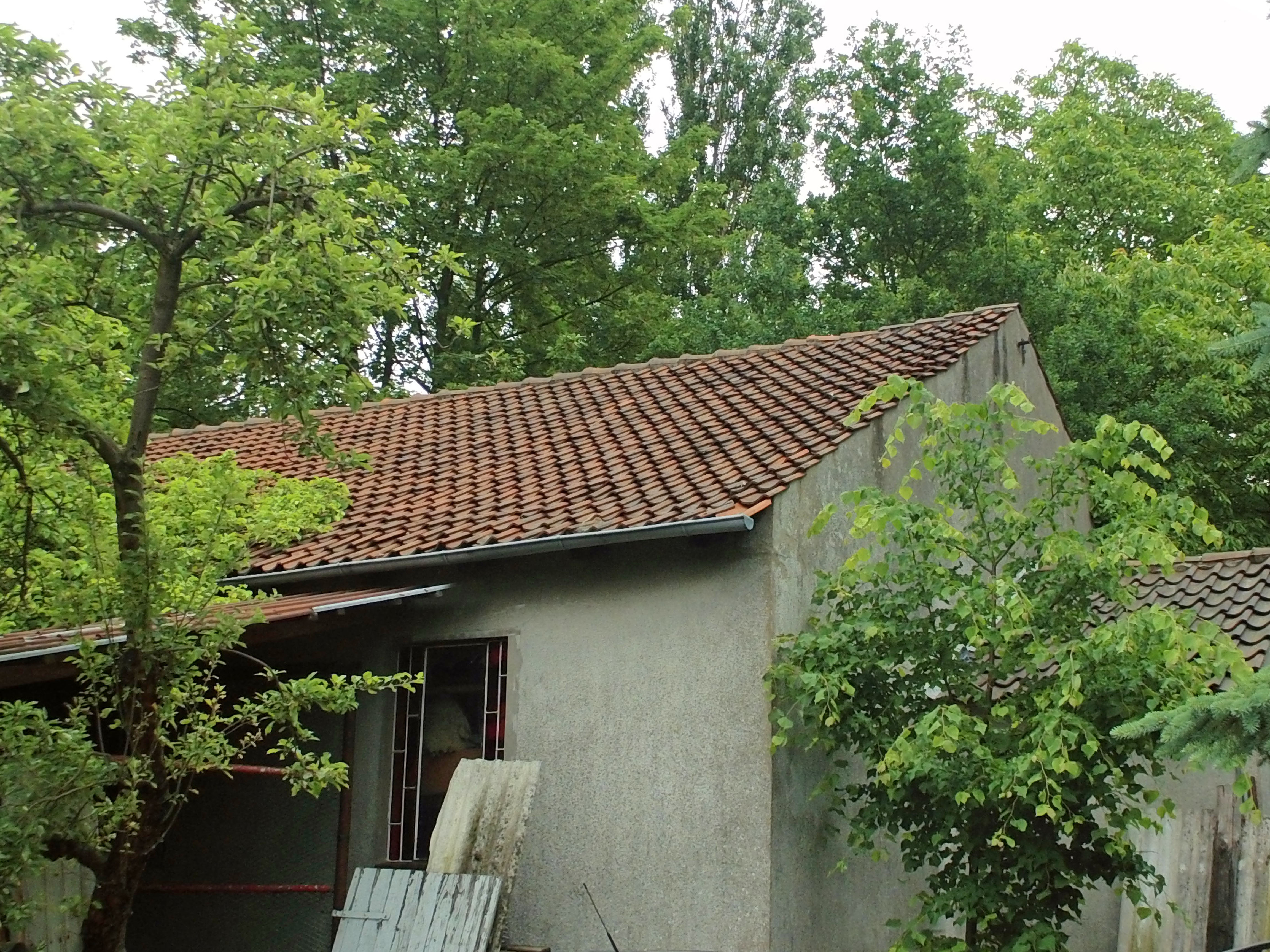 Ehemalige katholische Kirche "St. Maria Königin" (1953-1972) in Wittingen (Landkreis Gifhorn)